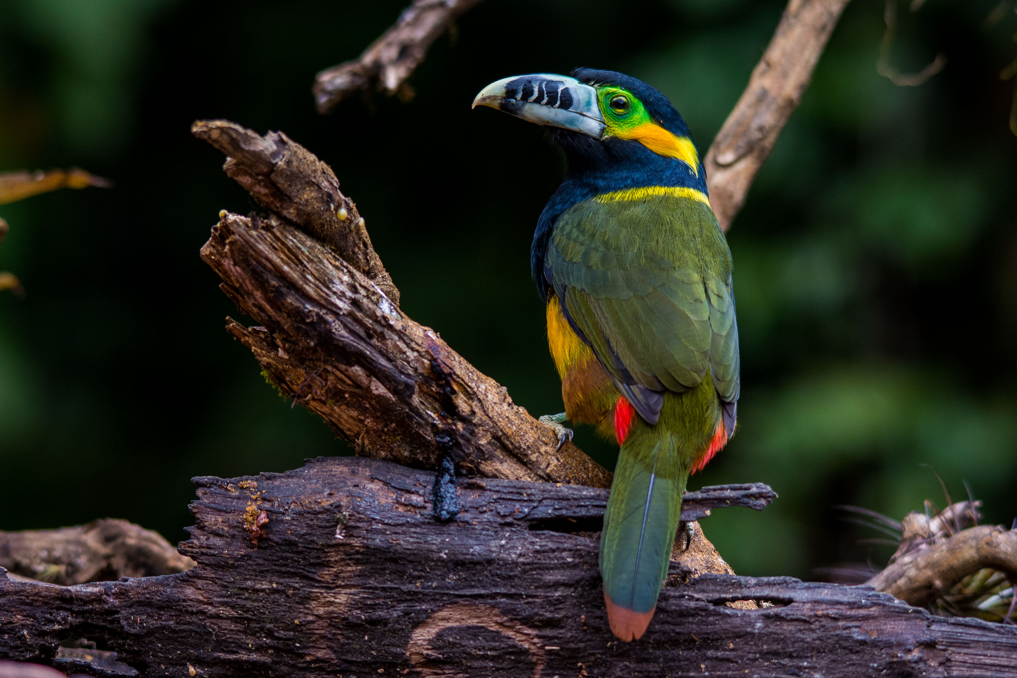 Araçari-poca (Selenidera maculirostris) macho fotografado na Trilha dos Tucanos (Mata Atlântica) em Tapiraí-SP